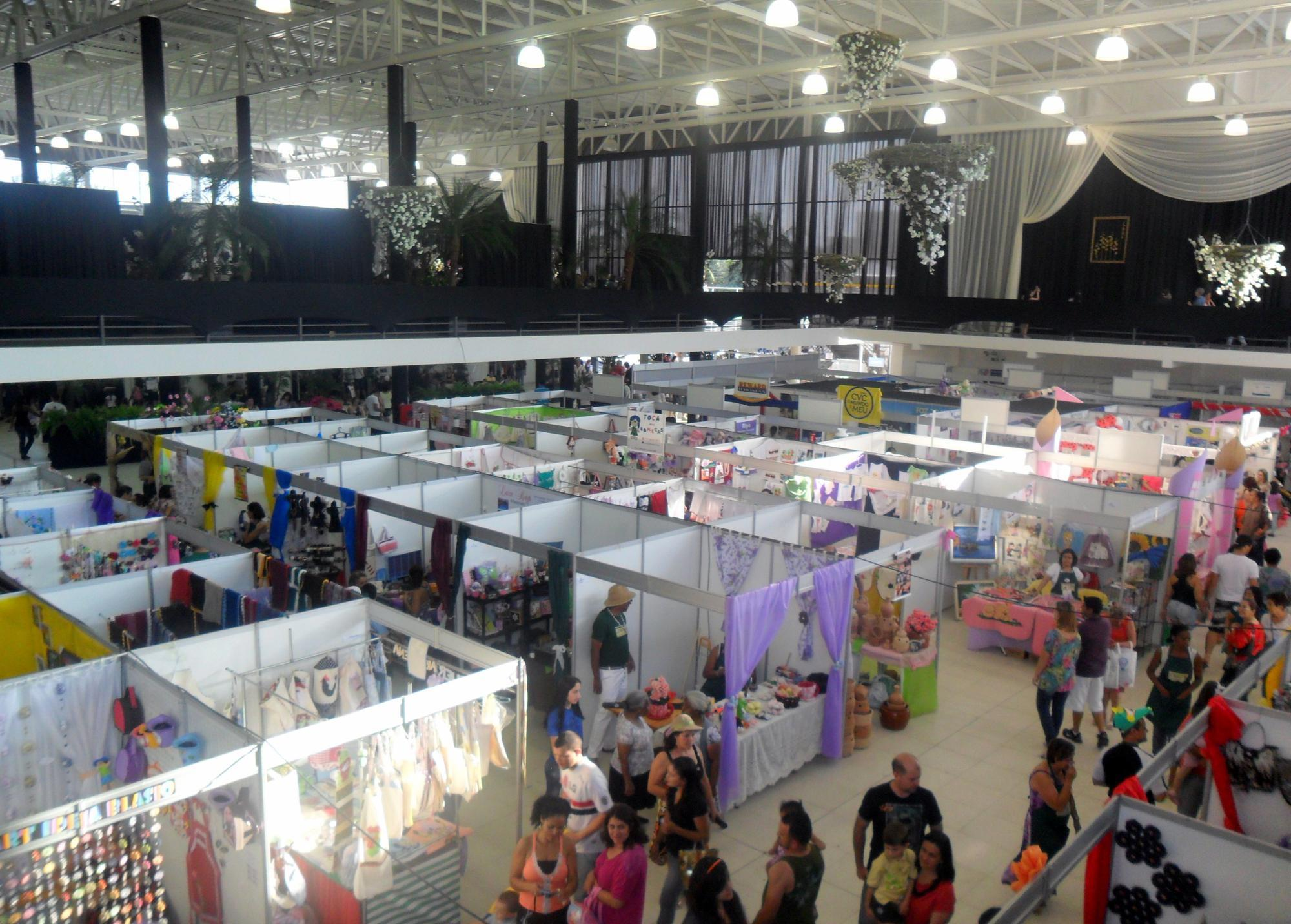 Exposição de Orquídeas e Plantas Ornamentais de Poá 2012